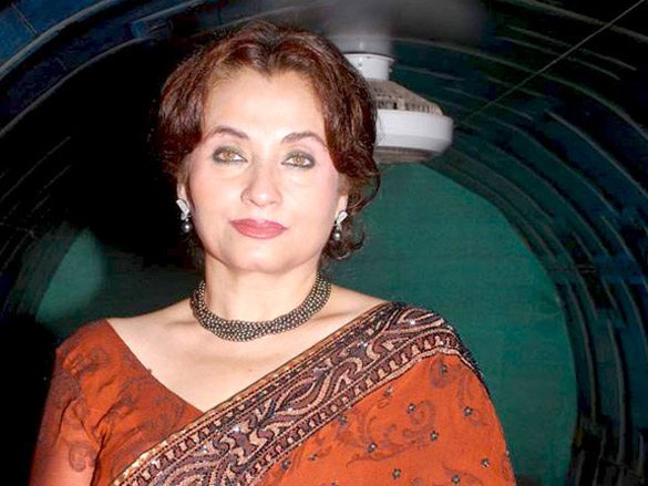 Salma Agha at her bash at Dockyard, Mumbai